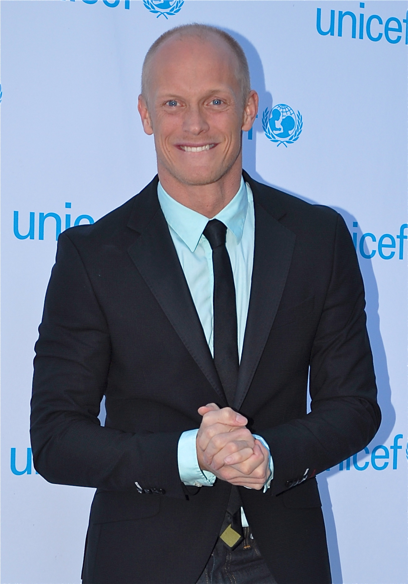 Tobias Karlsson på Unicef-gala i Stockholm den 1 maj 2012.